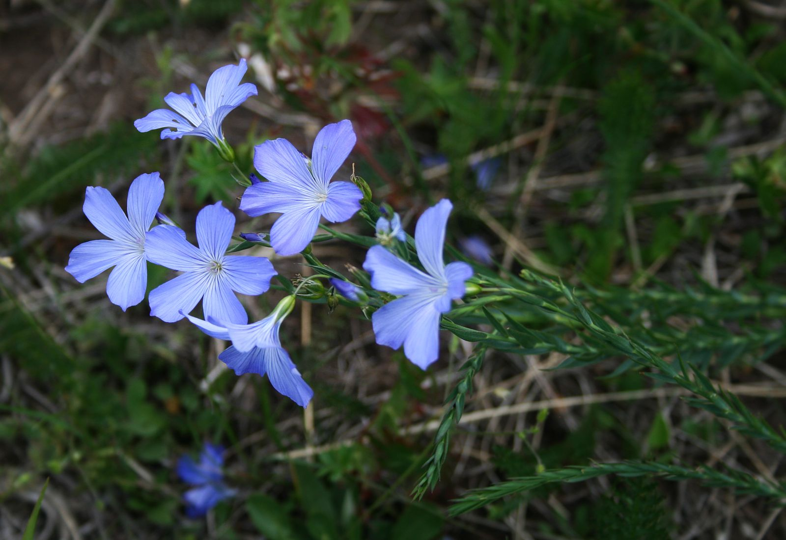 Linum narbonense, Leingewächse (Linaceae) - Slowenien/Slovenija/Slovenia: Primorska, Berg Slavnik bei Podgorje, Gipfelbereich